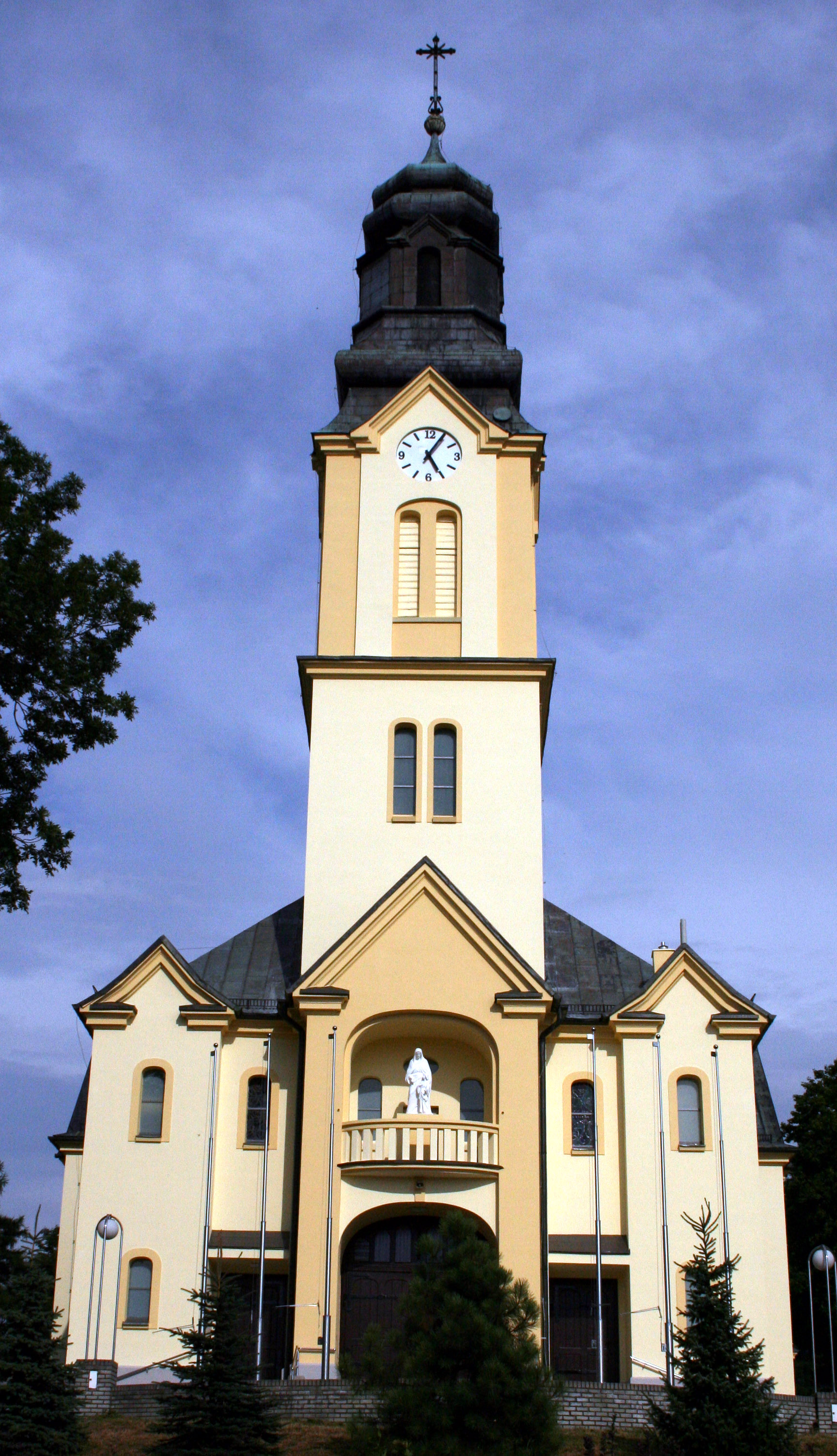 kościół p.w. św. Anny w Świerklanach Dolnych